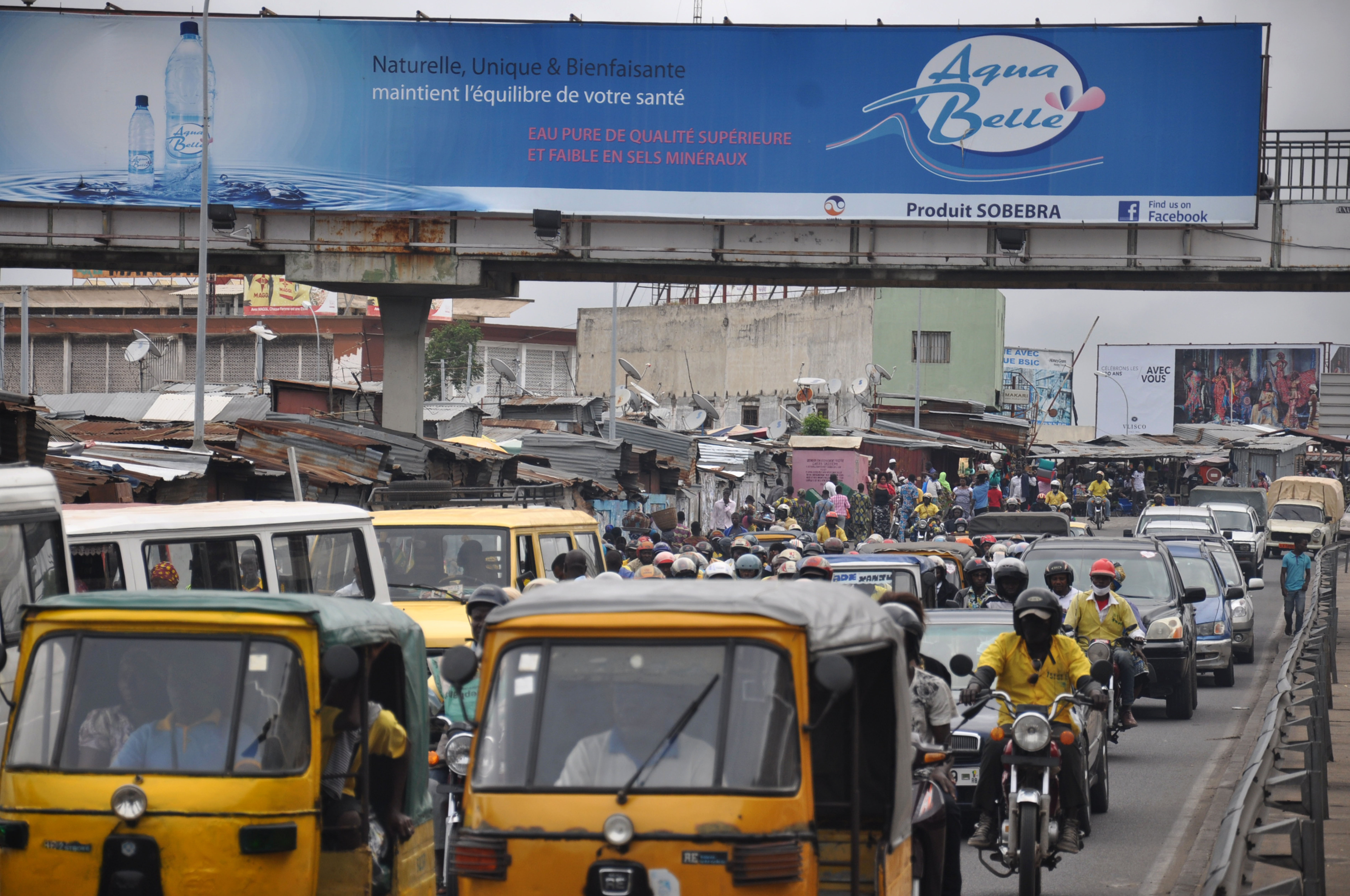 state officials behind schedule, stuck in traffic This is an image with the theme "Africa on the Move or Transport" from: Benin